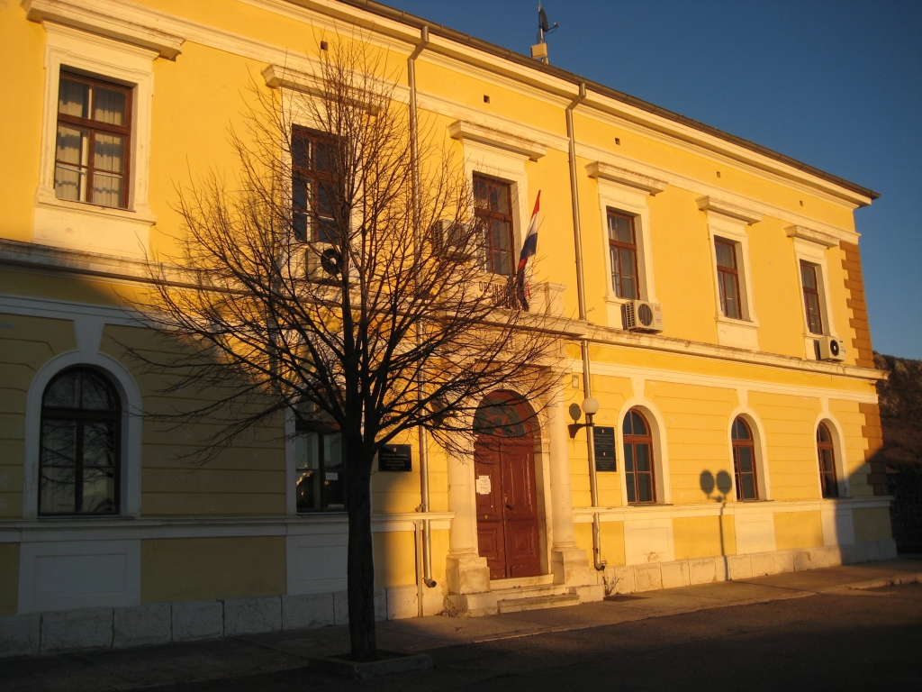 Zgrada poglavarstva općine Vinodolske u Bribiru